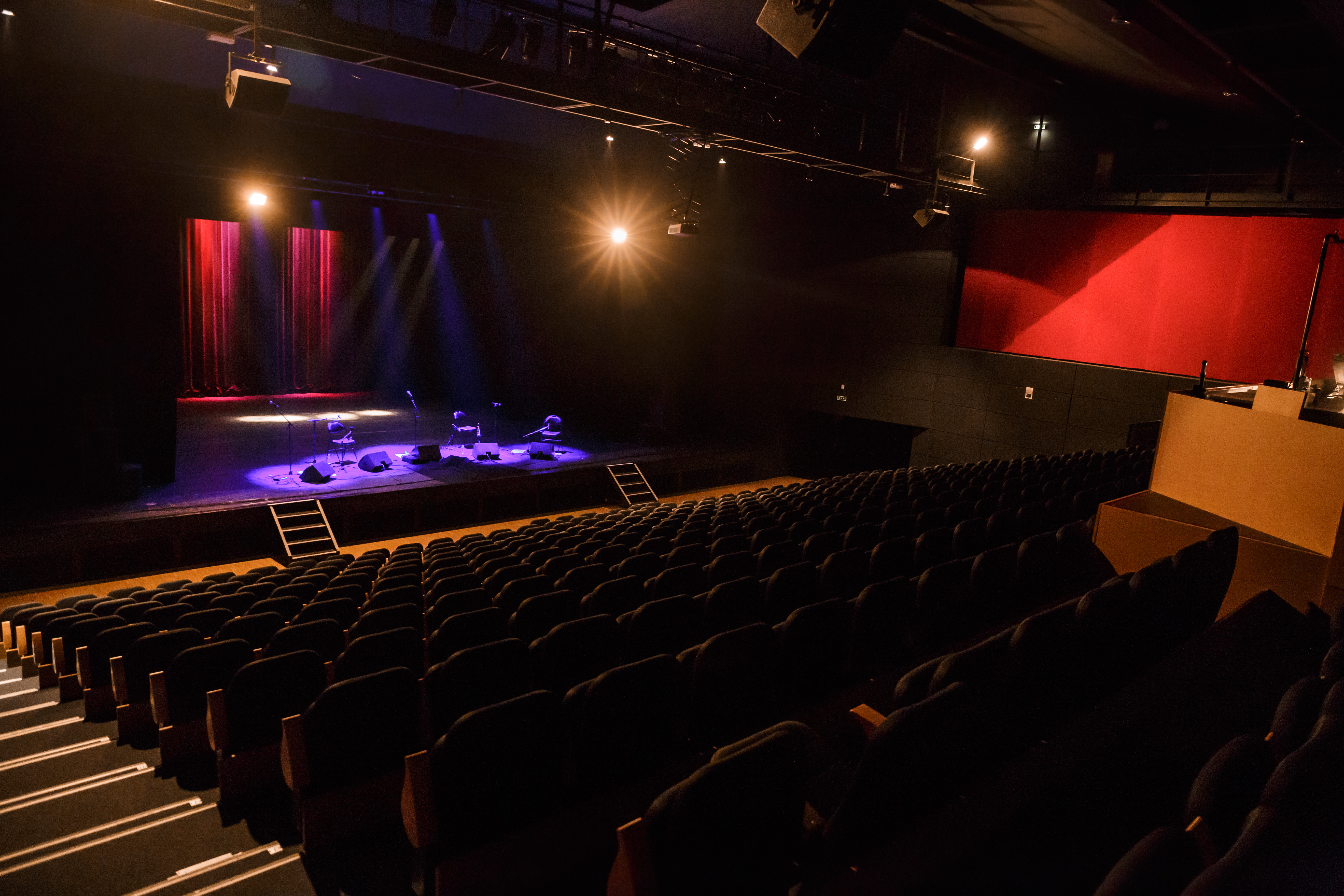 Intérieur de l'Espace Keraudy, Centre de la culture et des congrès à Plougonvelin